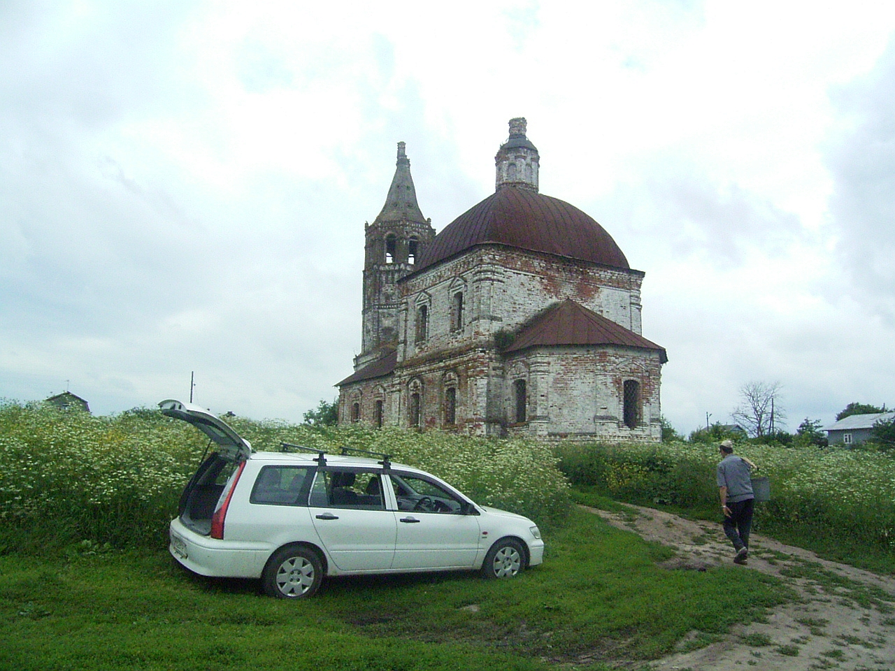 триЭПОХИ